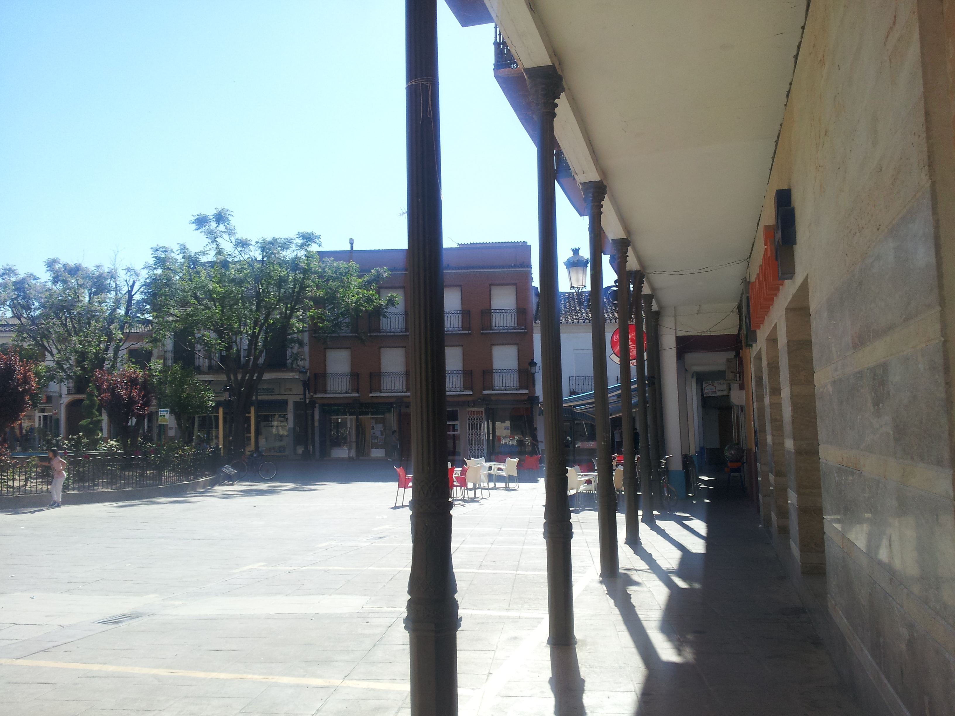 Vista parcial desde la esquina Nor-este de la plaza de España o plaza Mayor de Herencia, Provincia de Ciudad Real